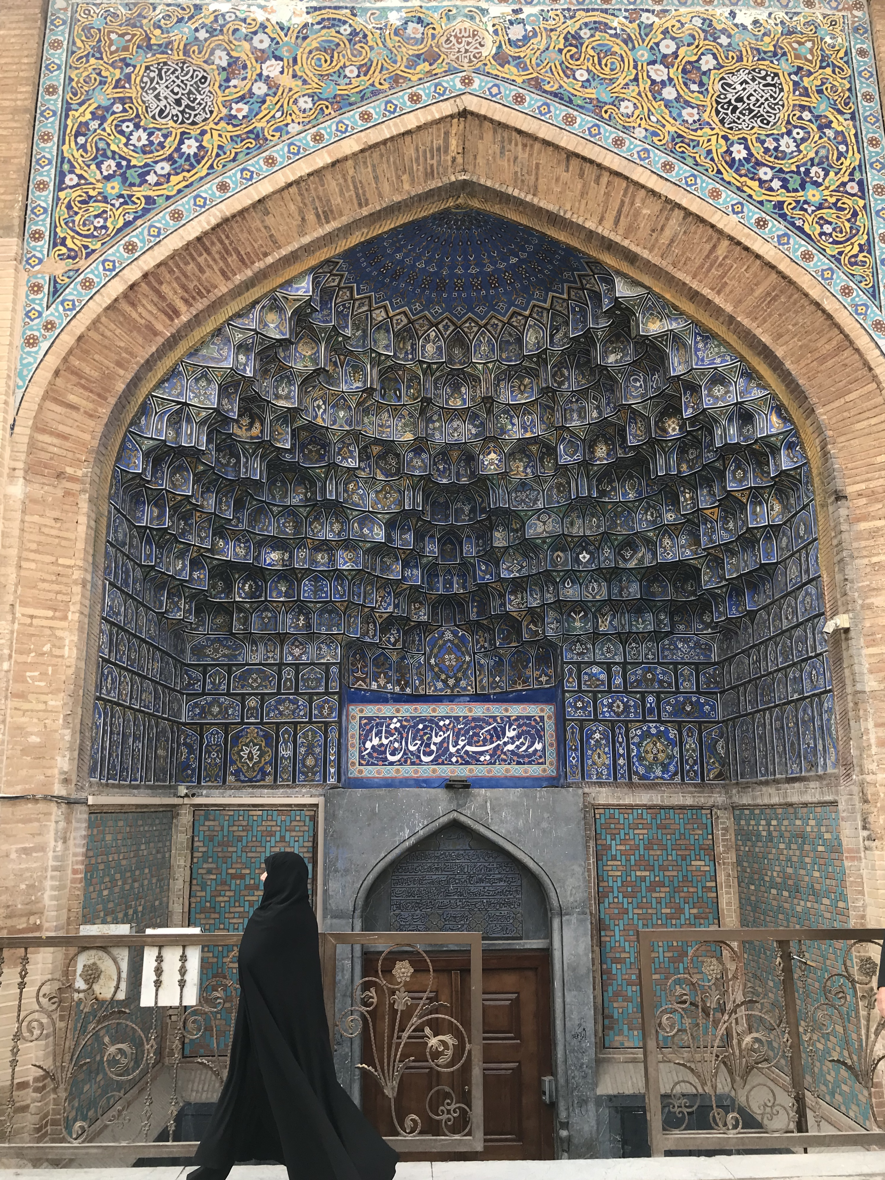 مدرسه عباسقلیخان